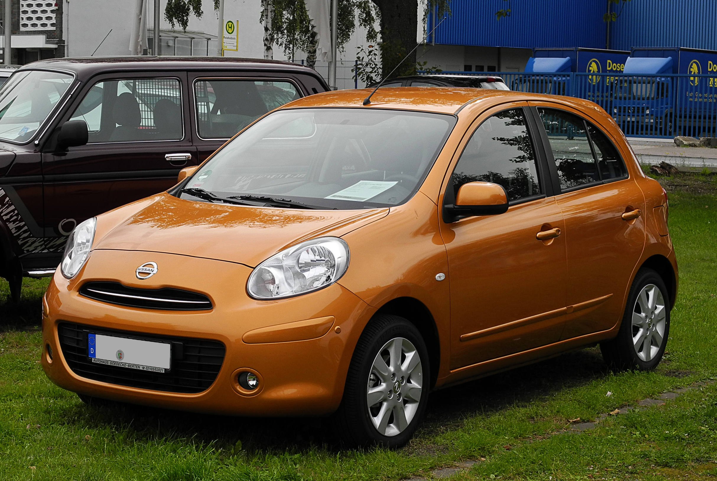 Nissan Micra 1.2 Acenta (K13)